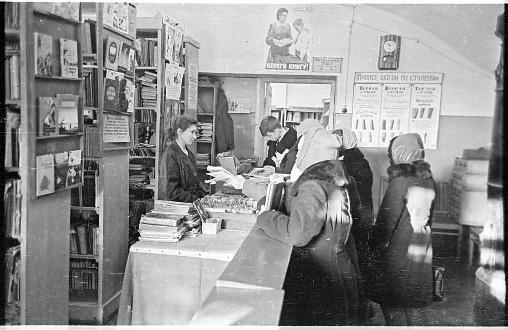 Детская библиотека. (По мнению ГБО:) Переславль, улица Ростовская, дом 1А, первый этаж. (По мнению Аршиновой:) Дом пионеров на улице Комсомольская, дом 2.